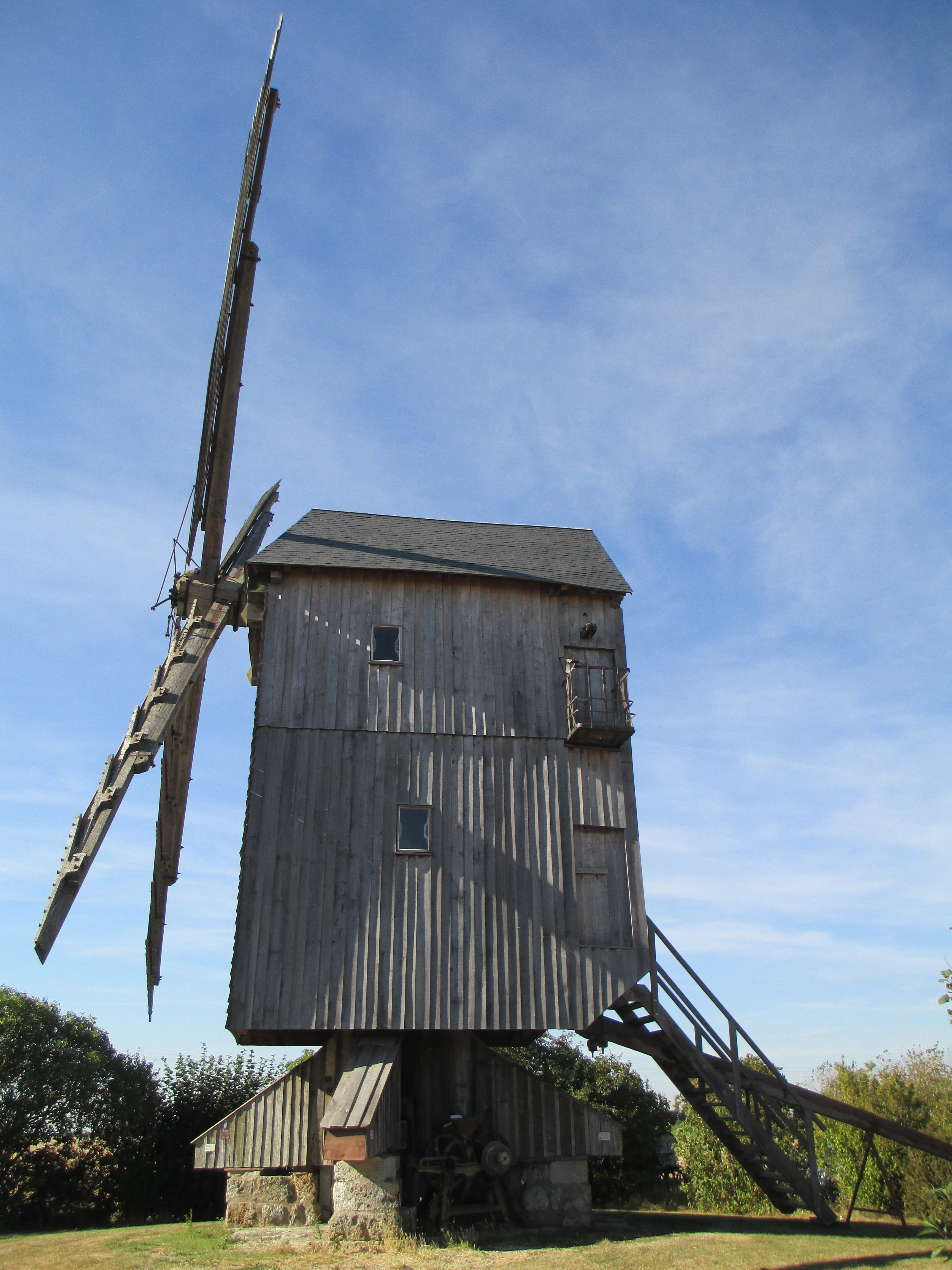 Moulin du Chesnay sur la commune de Moutiers (Eure-et-Loir). .